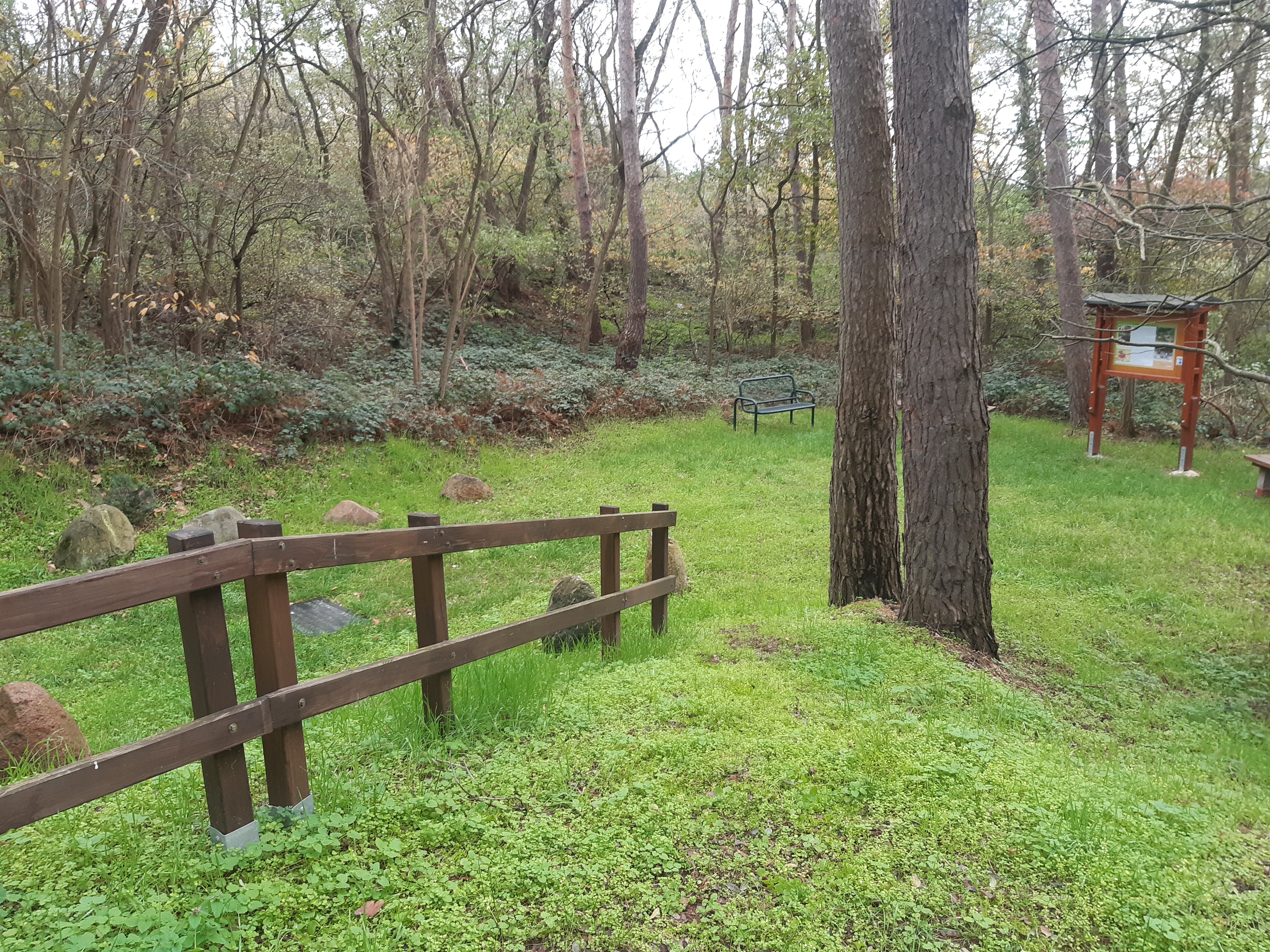 Infotafel